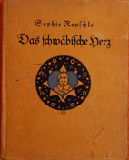 Buchtitel